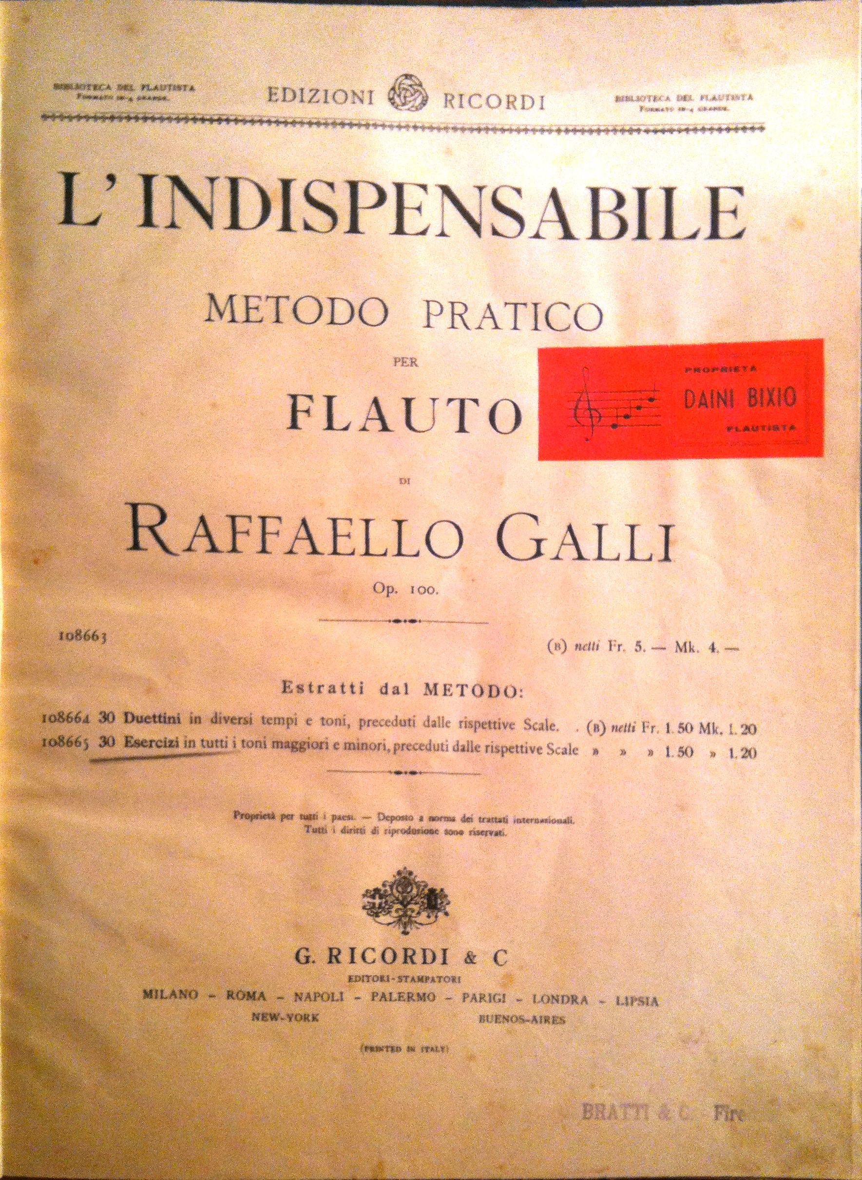 Raffaele Galli, L'INDISPENSABILE metodo per flauto (frontespizio)